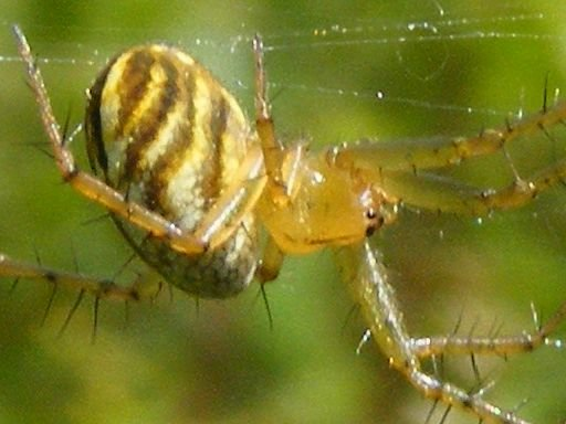 Mangora gibberosa : Photographié dans la région montréalaise le 27 août 2010, sur Fujifilm FinePix S700.